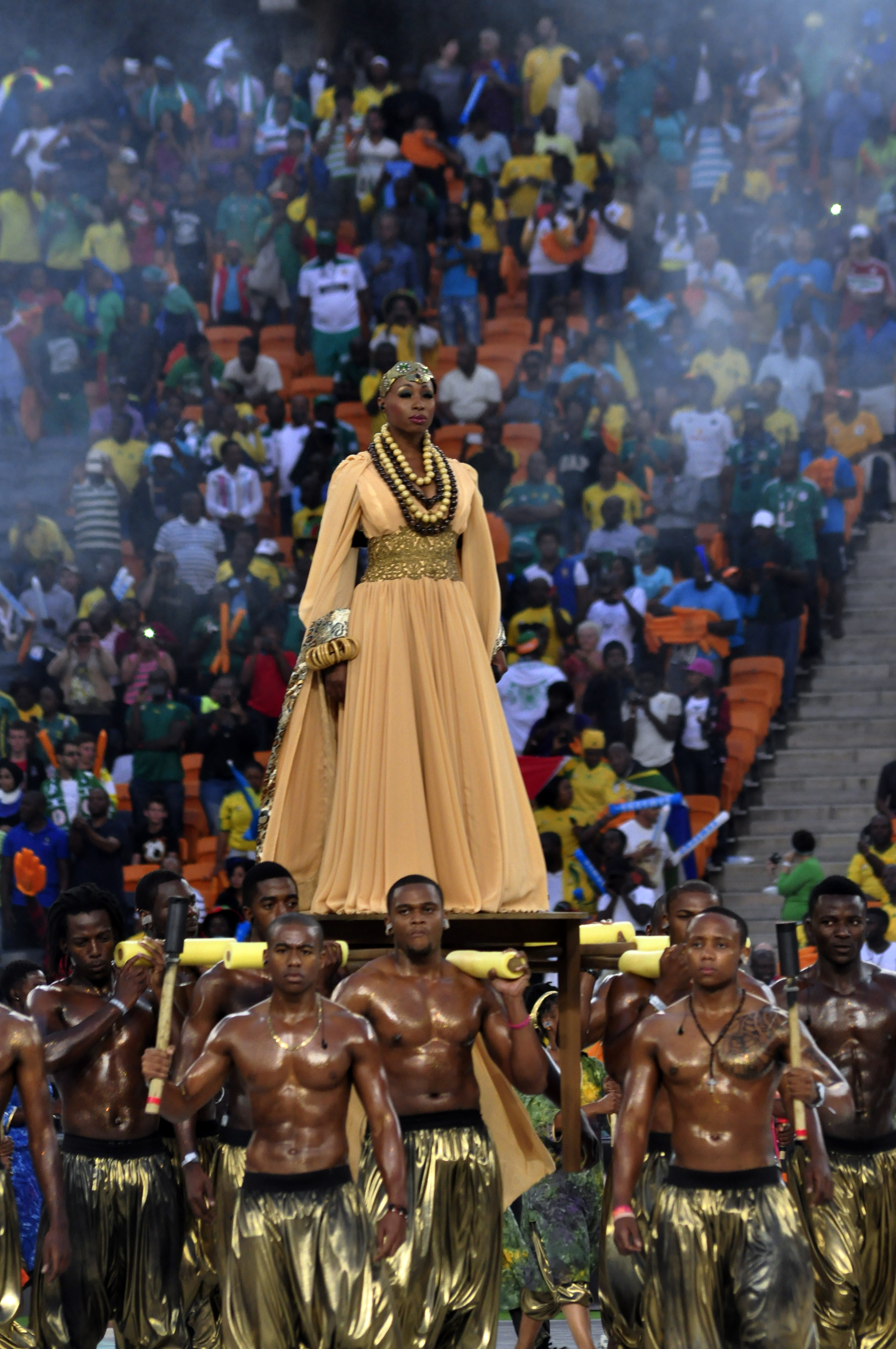 Un groupe d’artistes Sud africains transportant une chanteuse lors de la cérémonie de clôture de la CAN 2013 le 10 février 2013 au SOCCER CITY STADIUM de Johannesburg. This is an image with the theme "Africa on the Move or Transport" from: South Africa